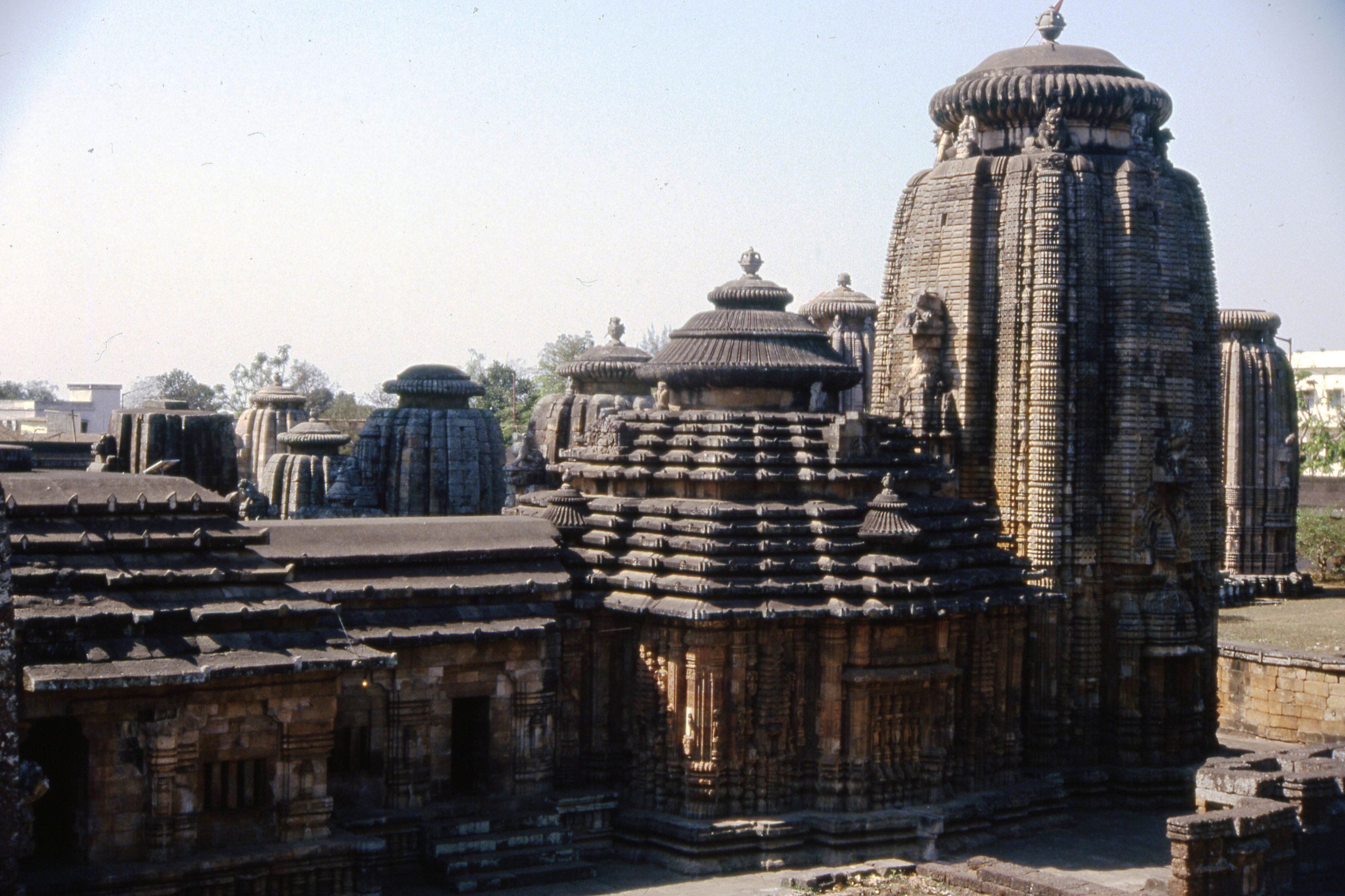 Siglo XI,Templo de Lingaraja, arquitectura kalinga,vista lateral del templo. Bhuvanesvar, Orissa, India.